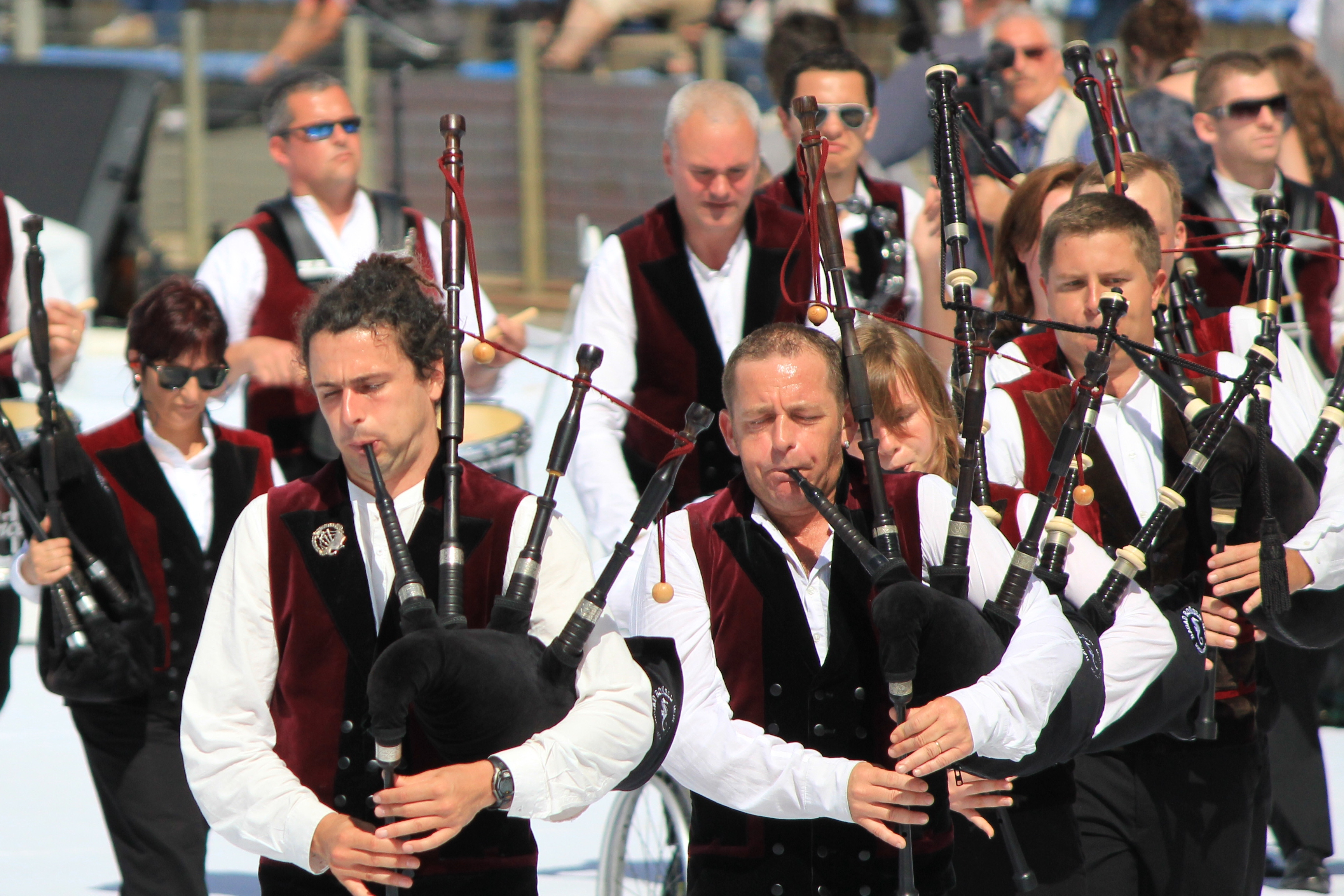 bagad Ronsed-Mor pendant le FIL 2012